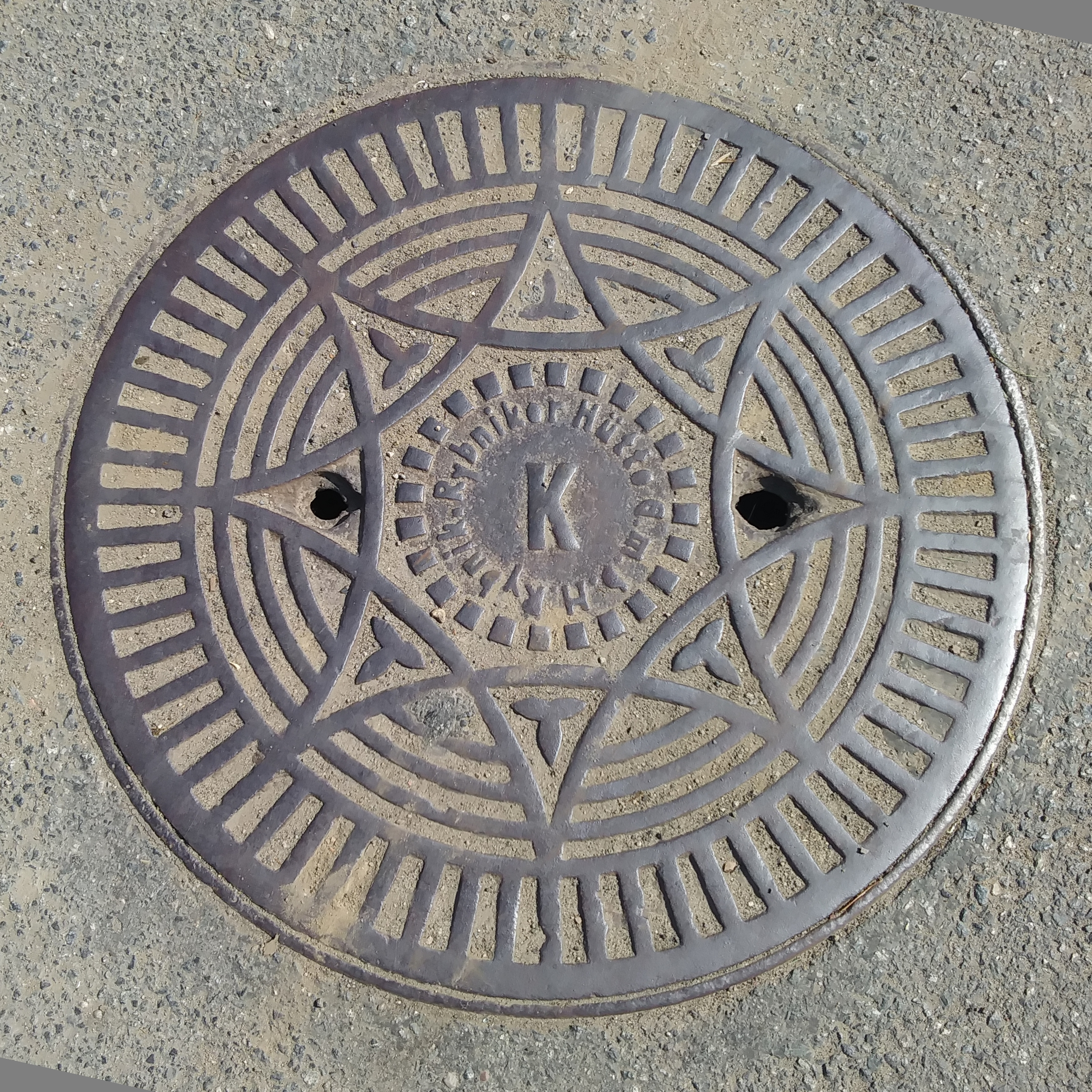 pokrywa studzienki kanalizacyjnej produkcji Rybniker Hütte GmbH (powstał zapewne pomiędzy 1889 a 1945) na ulicy świętych Cyryla i Metodego w Bytomiu-Łagiewnikach